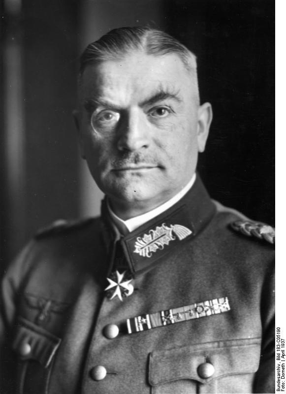 Friedrich v. Rabenau Generalleutnant Dr. phil.h.c. Friedrich v. Rabenau Am 16.April wird im Heeresarchiv Potsdam, dem Gebäude der ehem. Kriegsschule auf dem Brauhausberg, die Errichtung der Heeresarchive durch eine kurze militärische Feier festlich begangen. Seit dem 1.April d. J. hat das Heer eigene Arichive. Zum Chef der Heeresarchive wurde Generalleutnant Dr. h. c. von Rabenau ernannt, ihm unterstehen die Heeresarchive Dresden, München, Potsdam und Stuttgart. Scherl Bilderdienst, 13.04.1937 Fot. Dorneth 4705-37 [Porträt Friedrich von Rabenau] Abgebildete Personen: Rabenau, Friedrich von Dr.: Generalleutnant, Chef der Heeresarchive, Deutschland